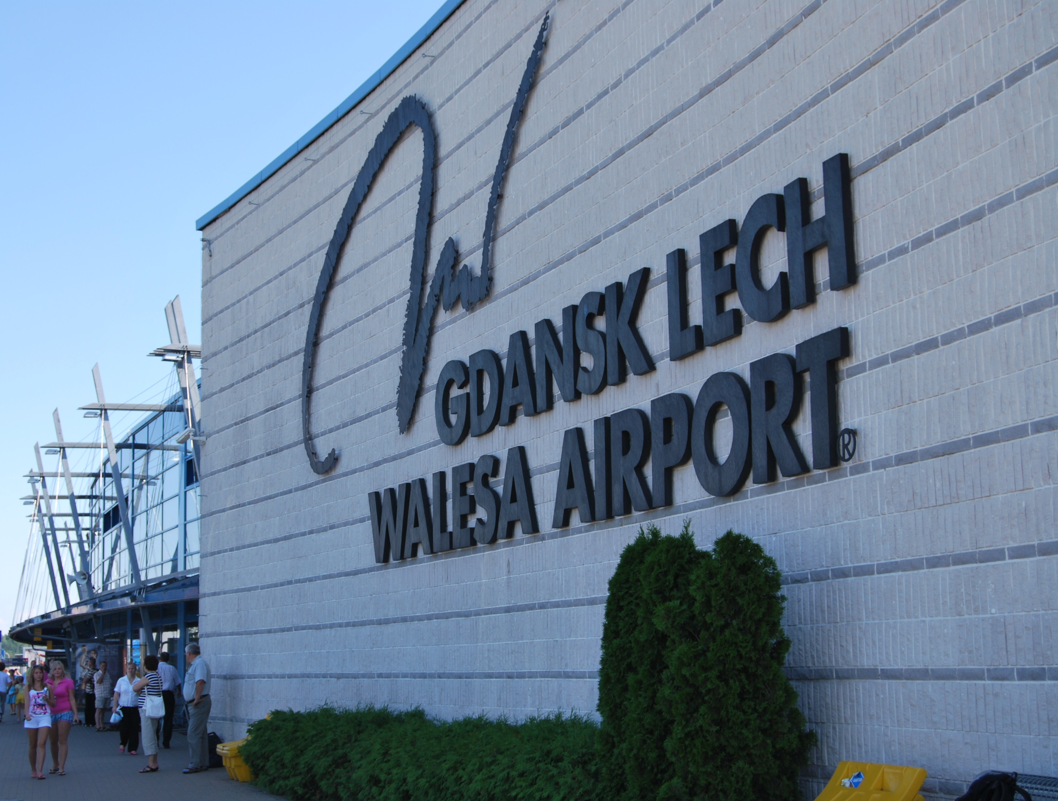 Port lotniczy im. Lecha Wałęsy w Gdańsku (2009 r.). Terminal T1.